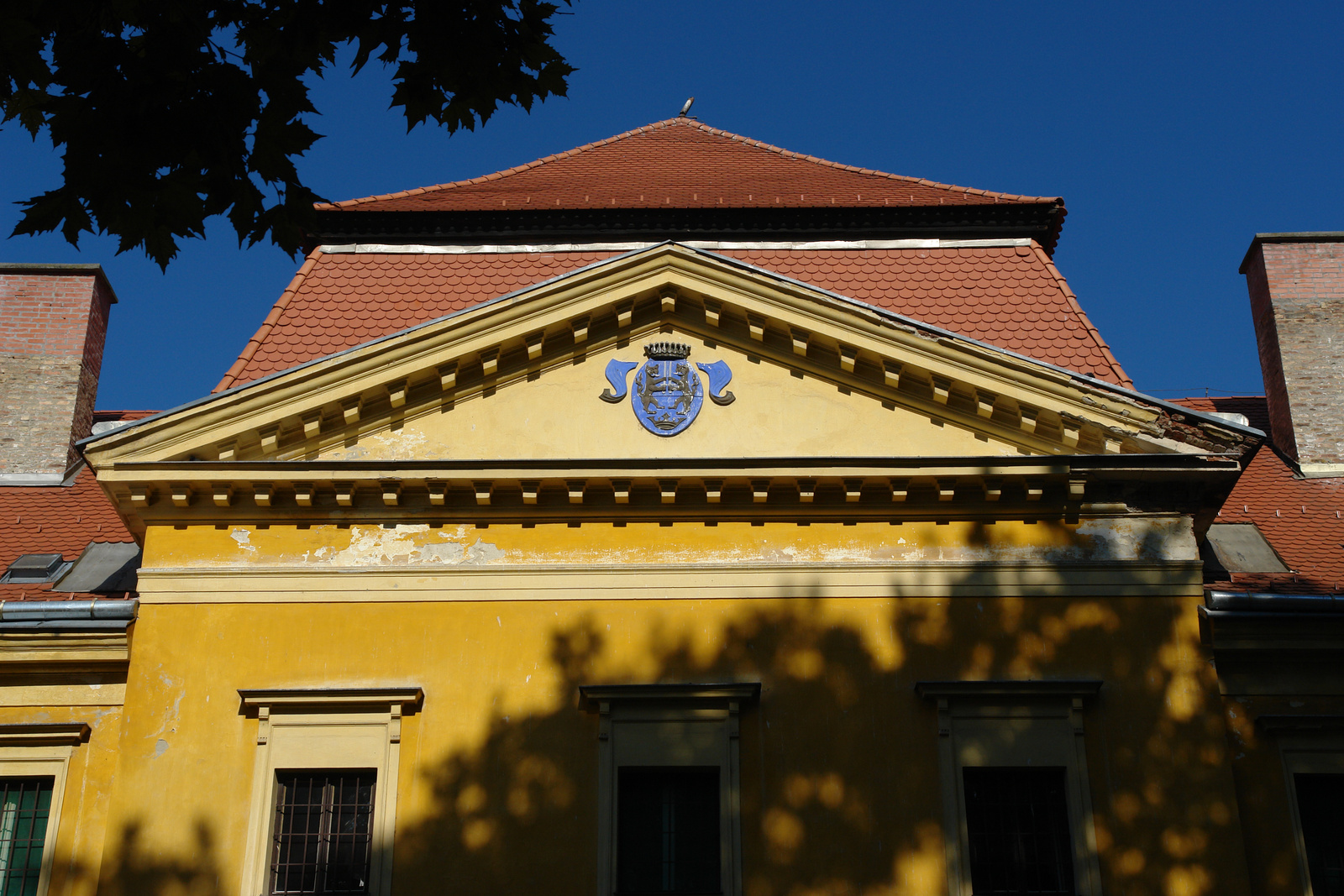 v. Festetich-kastély (Berzence, Szabadság tér 17 .) This is a photo of a monument in Hungary. Identifier: 7825